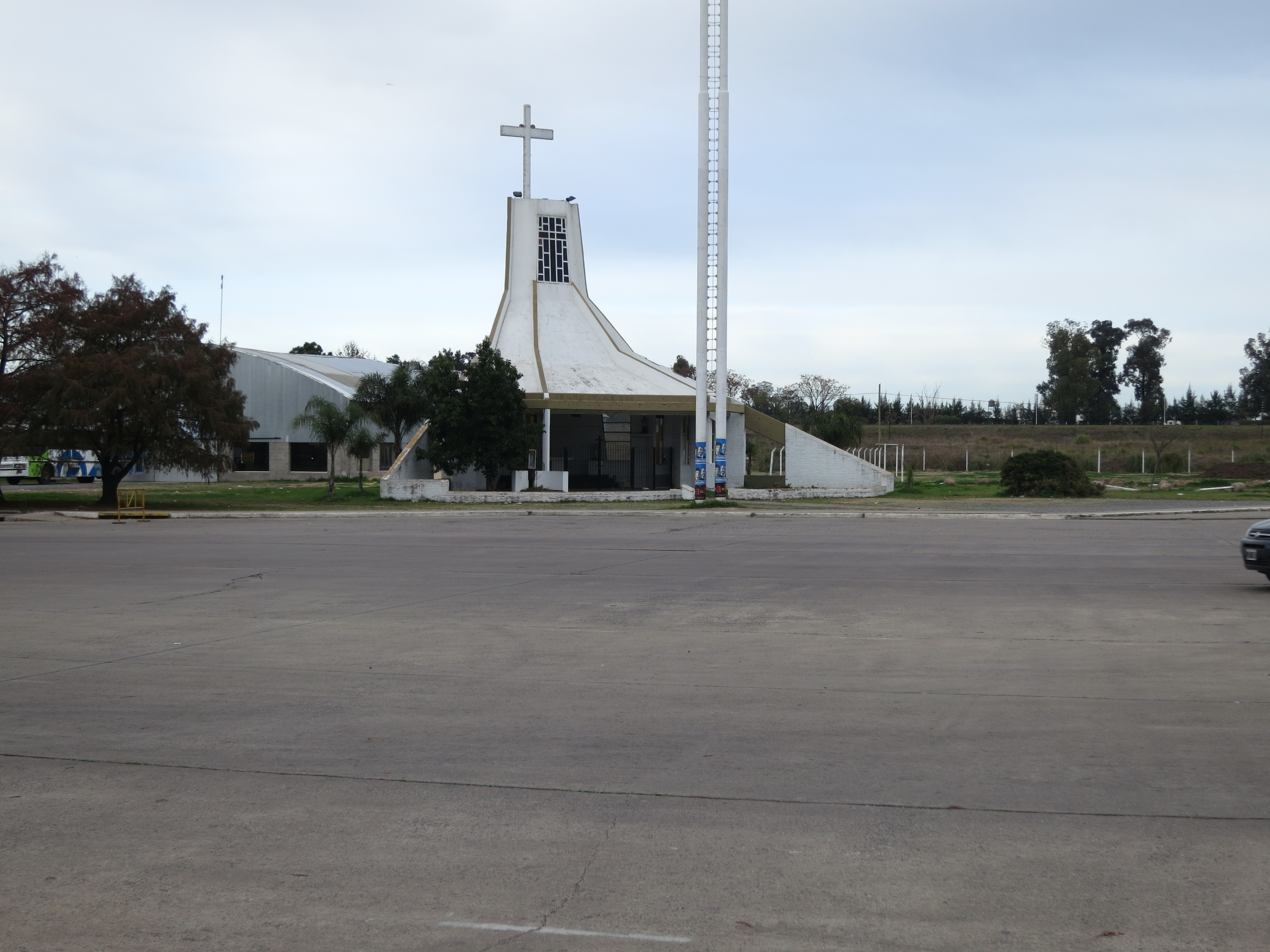 capilla